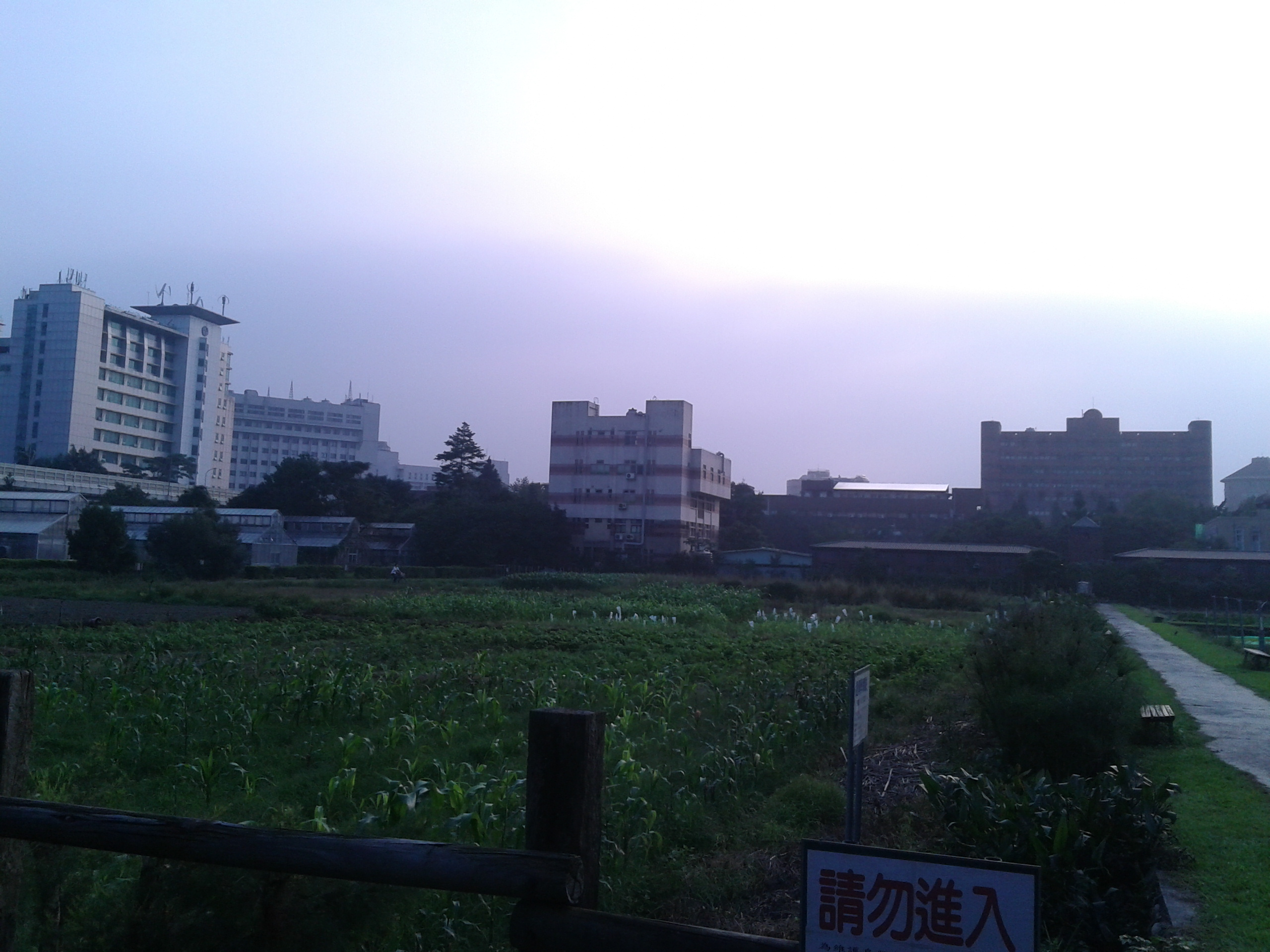 中文（台灣）: 台大農場傍晚